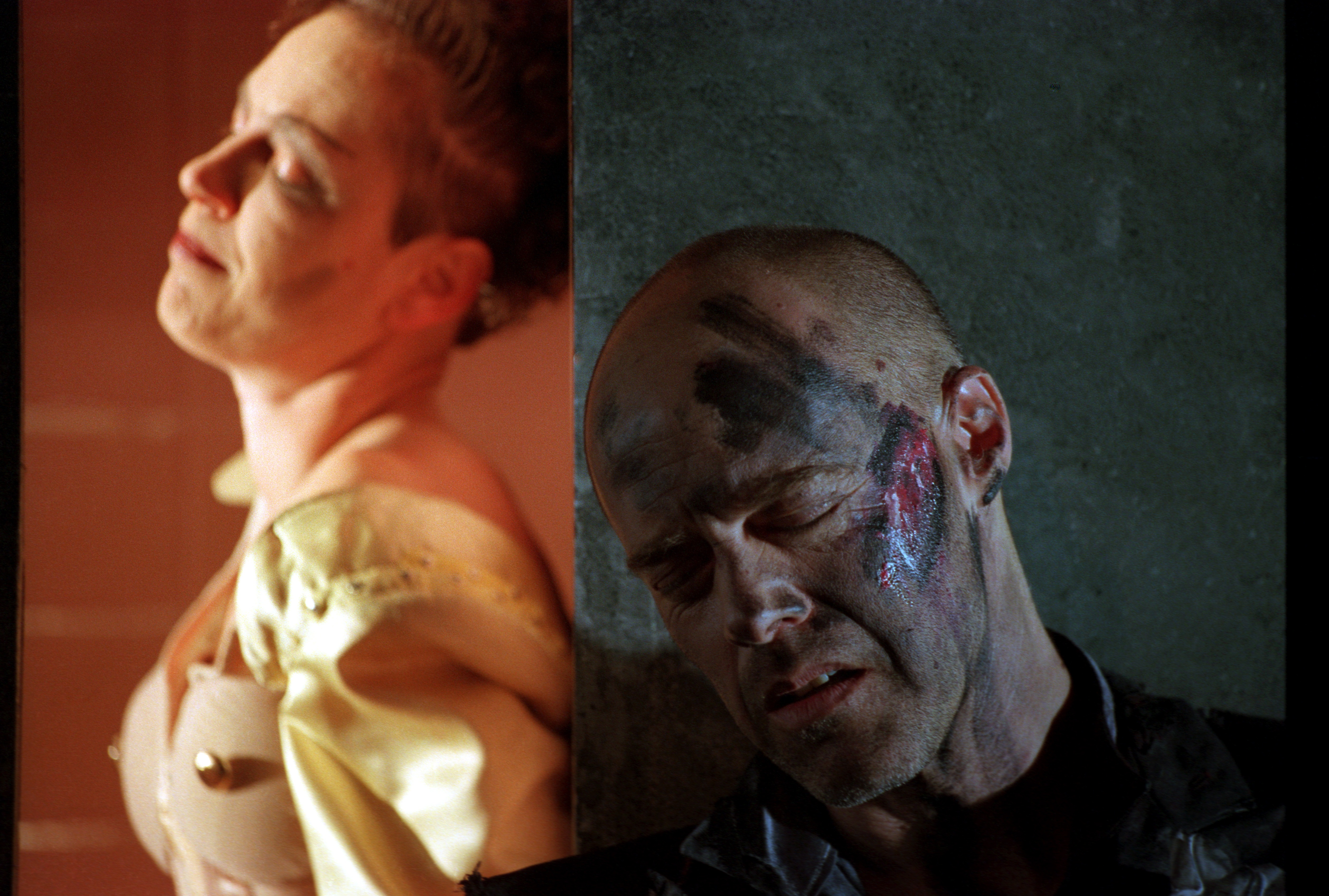 דורון תבורי ושירי יוסיפון בהצגה "מדאה", בתיאטרון הבימה